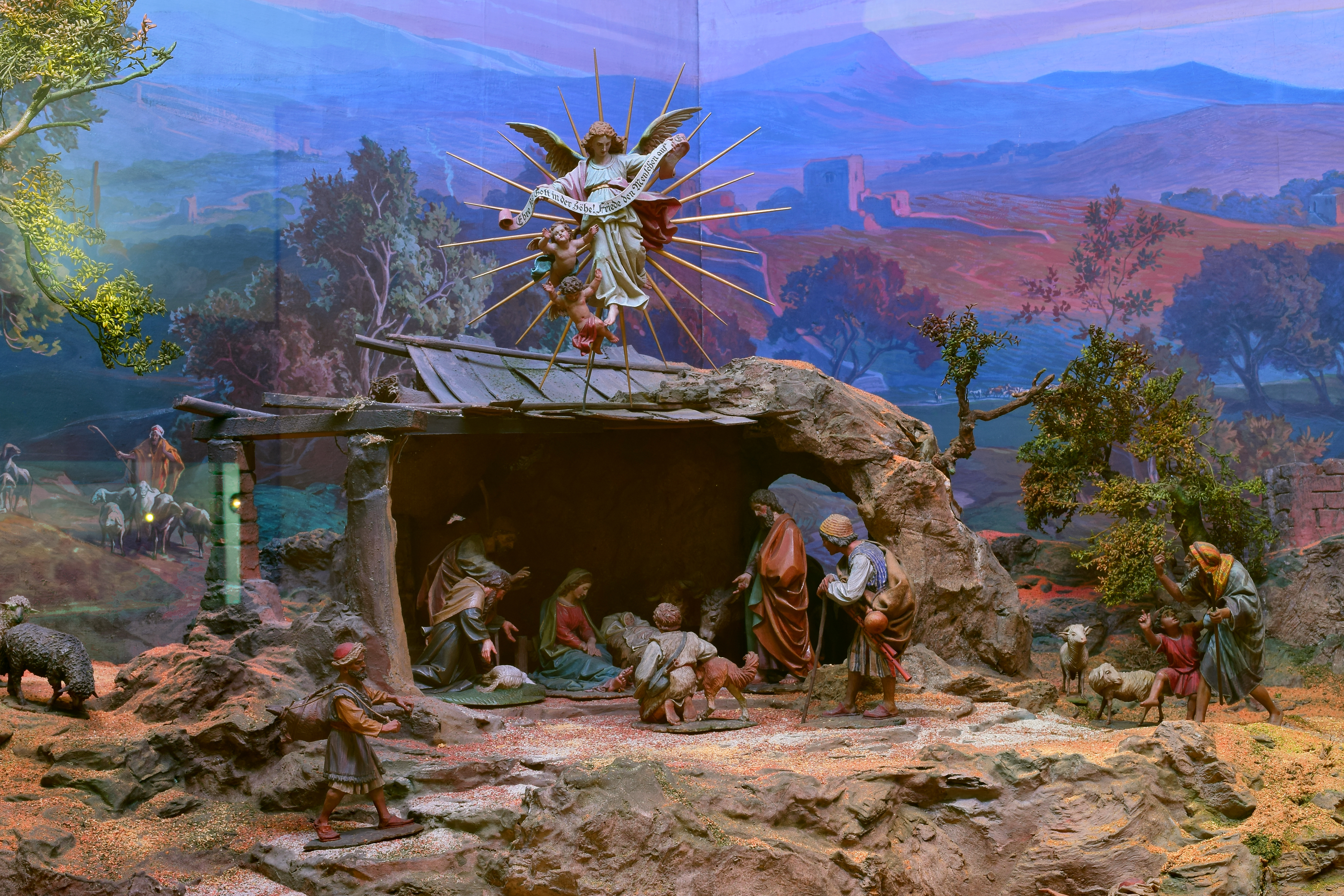 Teil der Krippensammlung im Tiroler Volkskunstmuseum in Innsbruck. Die Gehri-Krippe wurde zwischen 1895 und 1905 in Innsbruck von Max Gehri (1847-1909, Innsbruck) geschaffen, dessen Werk sowohl die Figuren als auch der Krippenberg und der Hintergrund sind.